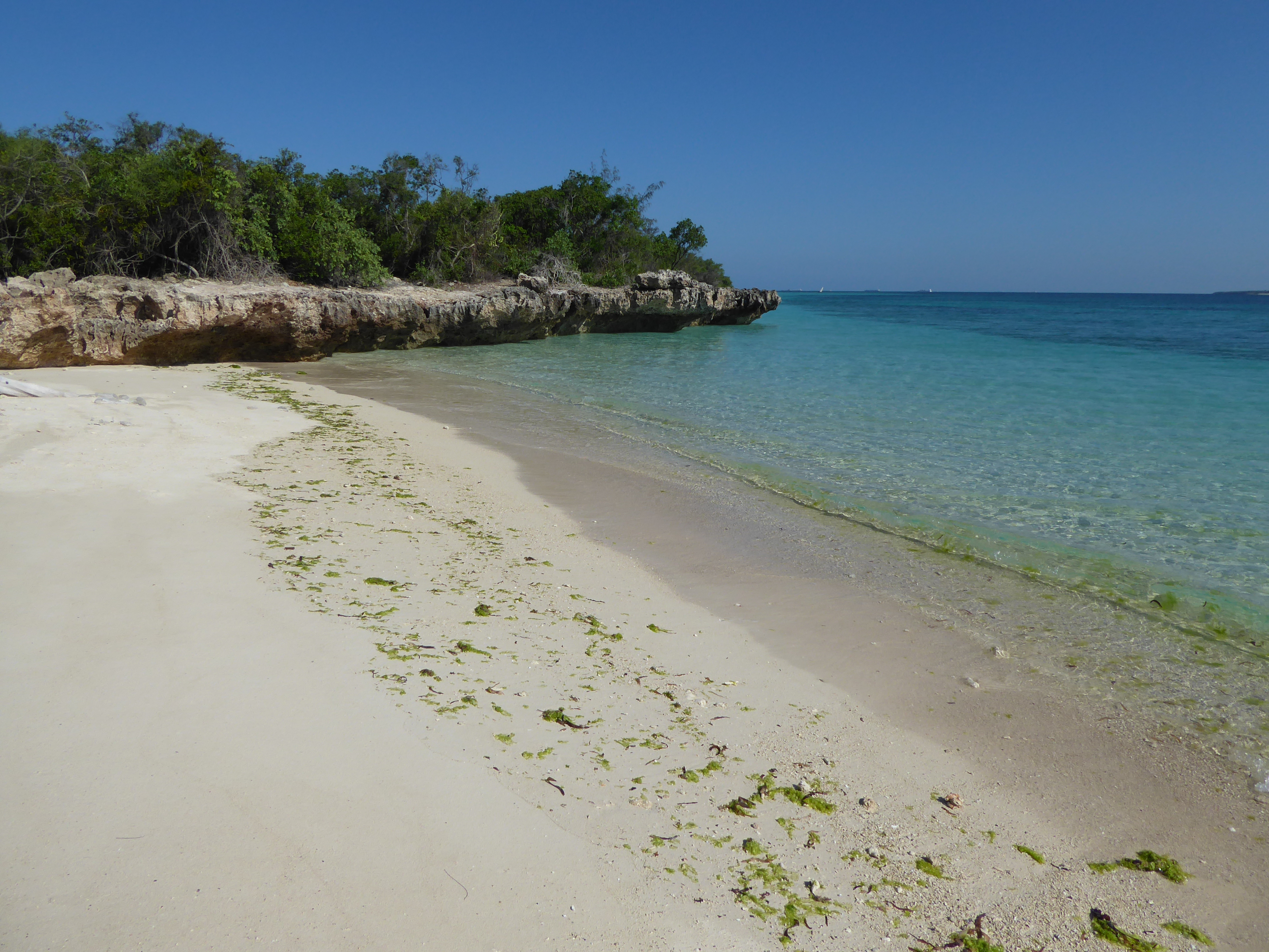 Mbudya island, Tanzania